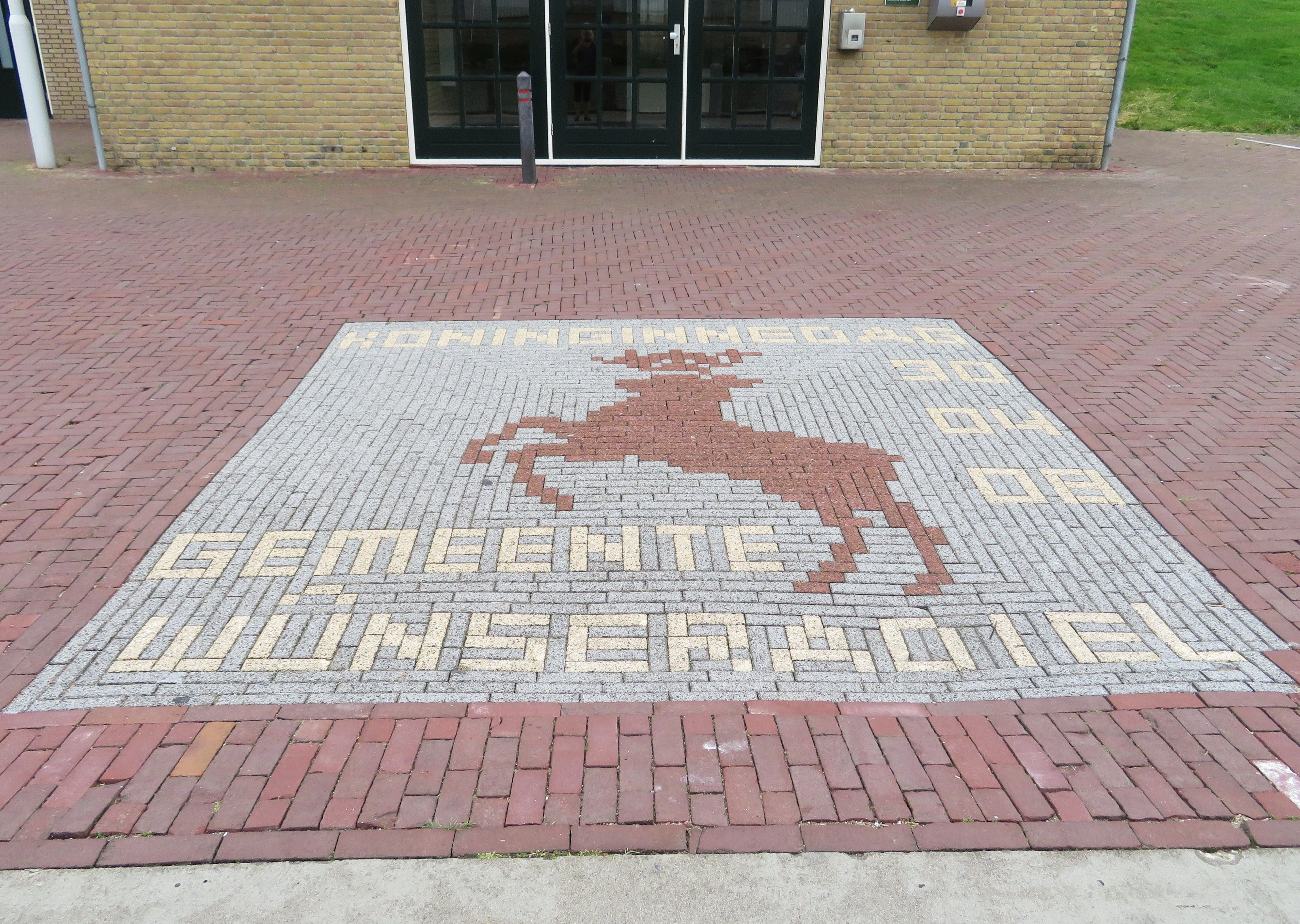 Mozaiek in de bestrating aan de haven van Makkum ter gelegenheid van het bezoek van Koningin Beatrix op Koninginnedag 2008